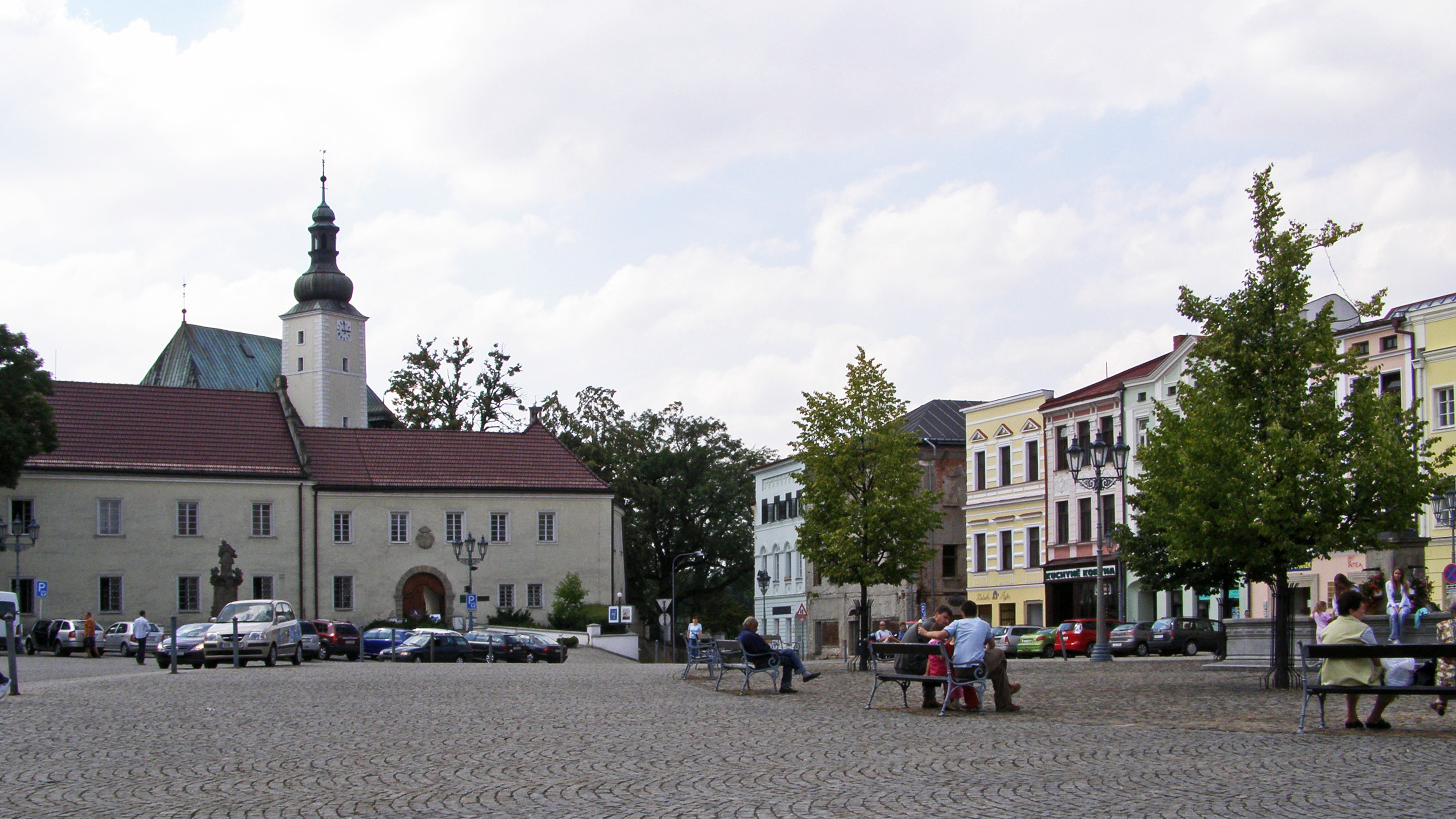 Frýdek-Místek, Frýdecké náměstí, zámek